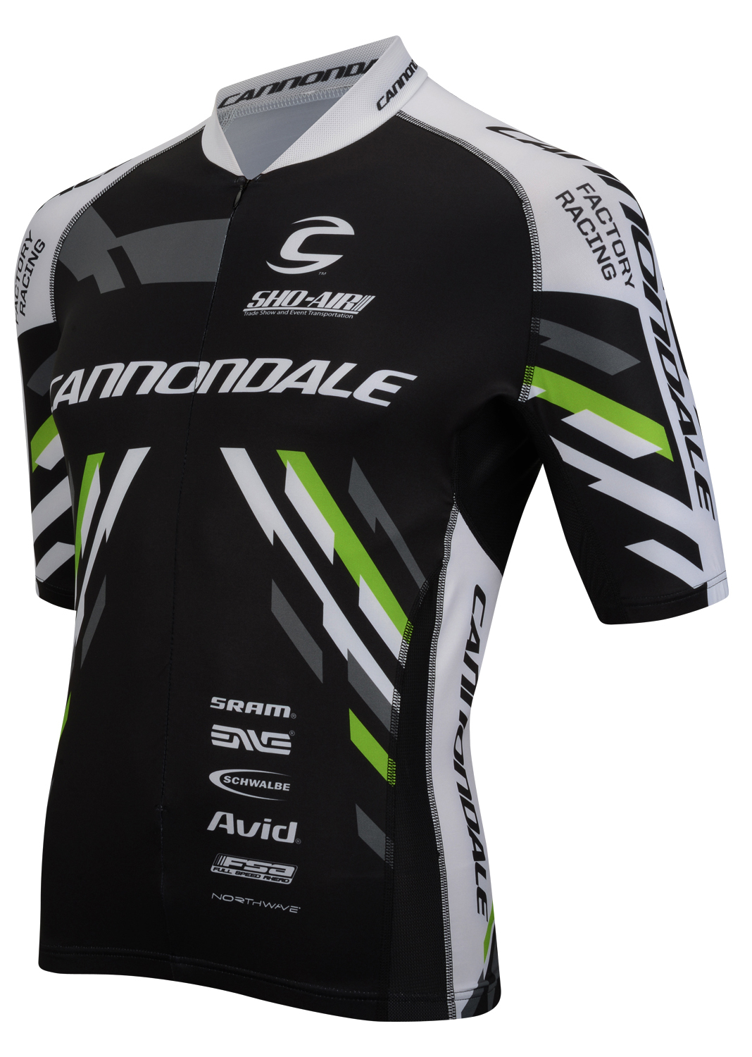 Монгол: Залуу дугуйчин клубийн албан ёсны өмсгөл